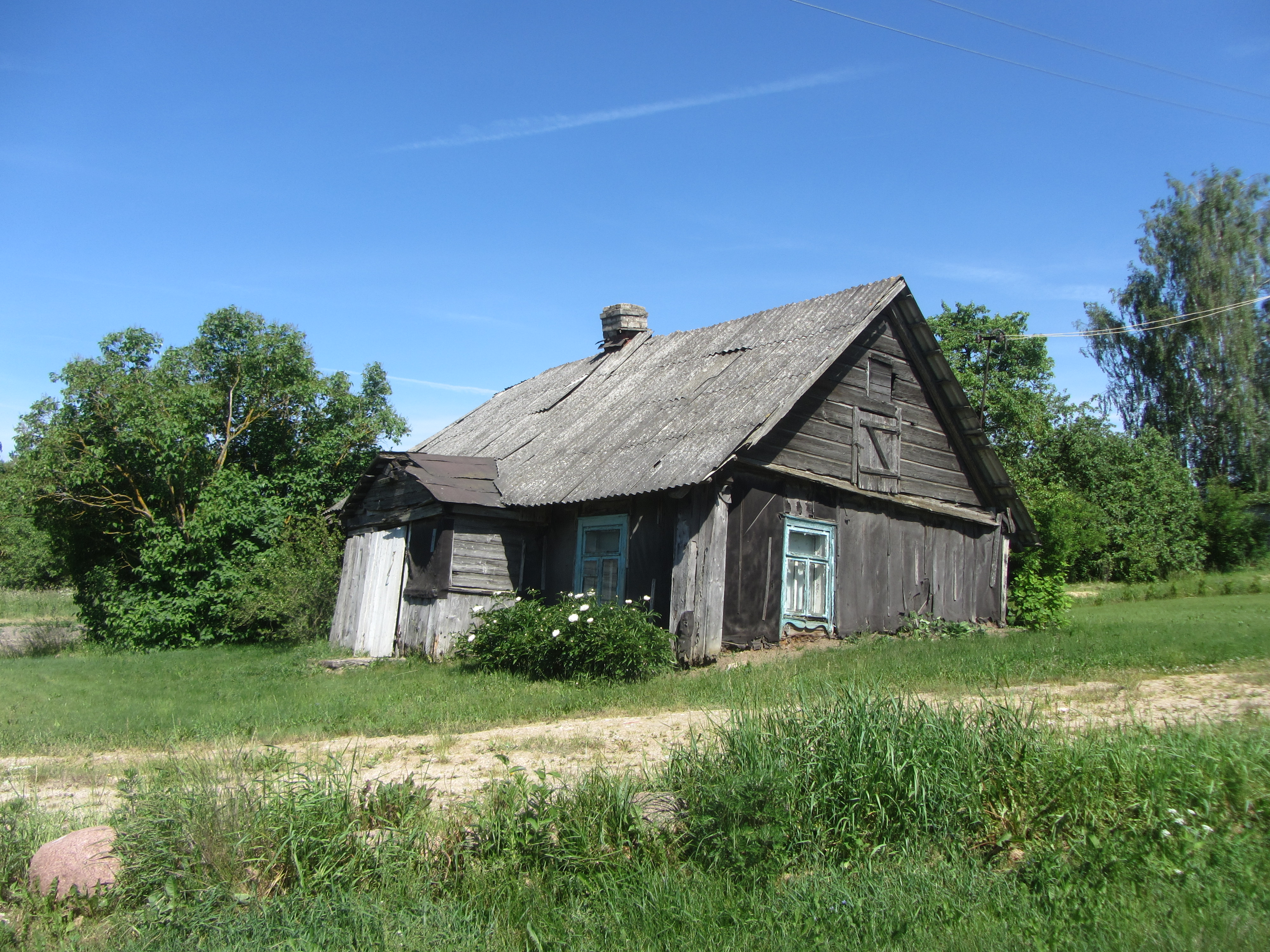 Nemaitonių sen., Lithuania